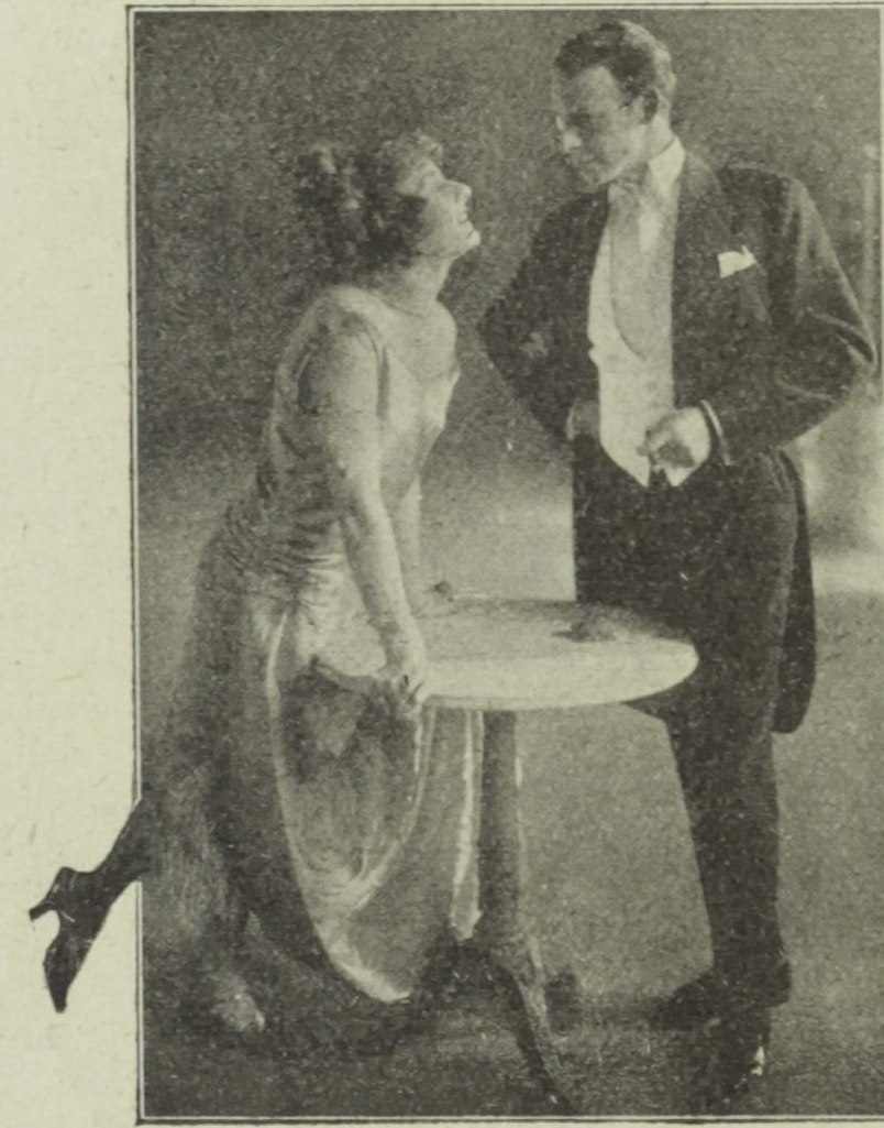 Ria Thiele als Lia und Wolf H. Kersten als Gyuri in „Antonia“ (Lustspiel in drei Akten (Vier Bildern) von Melchior Lengyel) im Wiener Raimundtheater